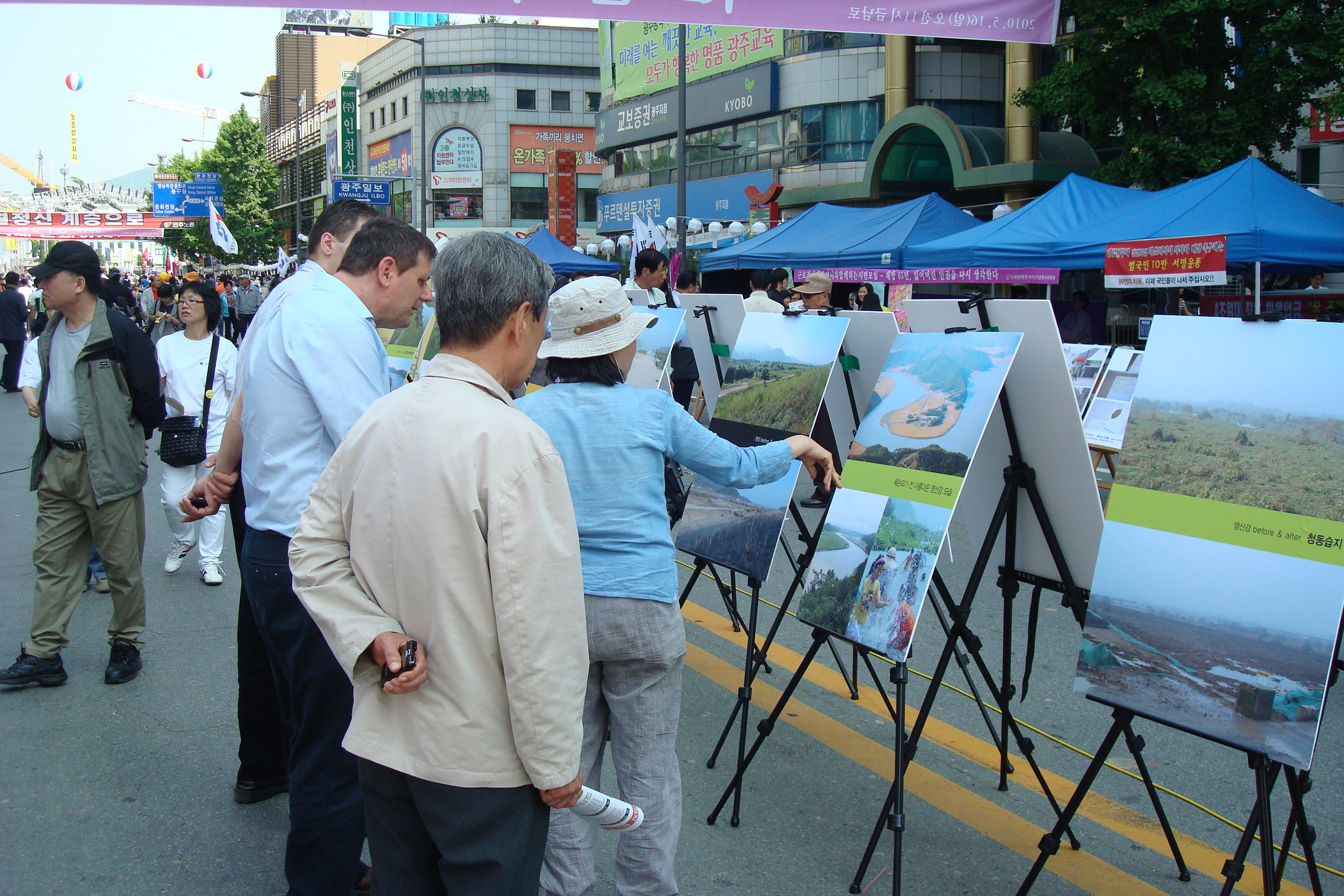 광주광역시 금남로에서 열린 4대강 정비사업 반대 사진 전시회